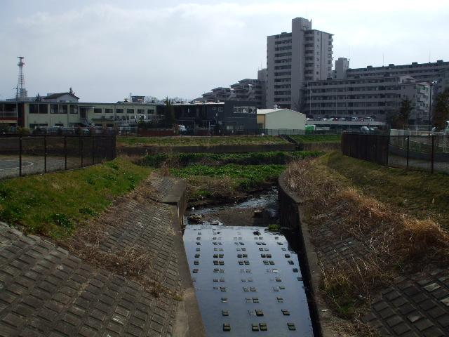 埼玉県さいたま市西区を流れる宮前川。